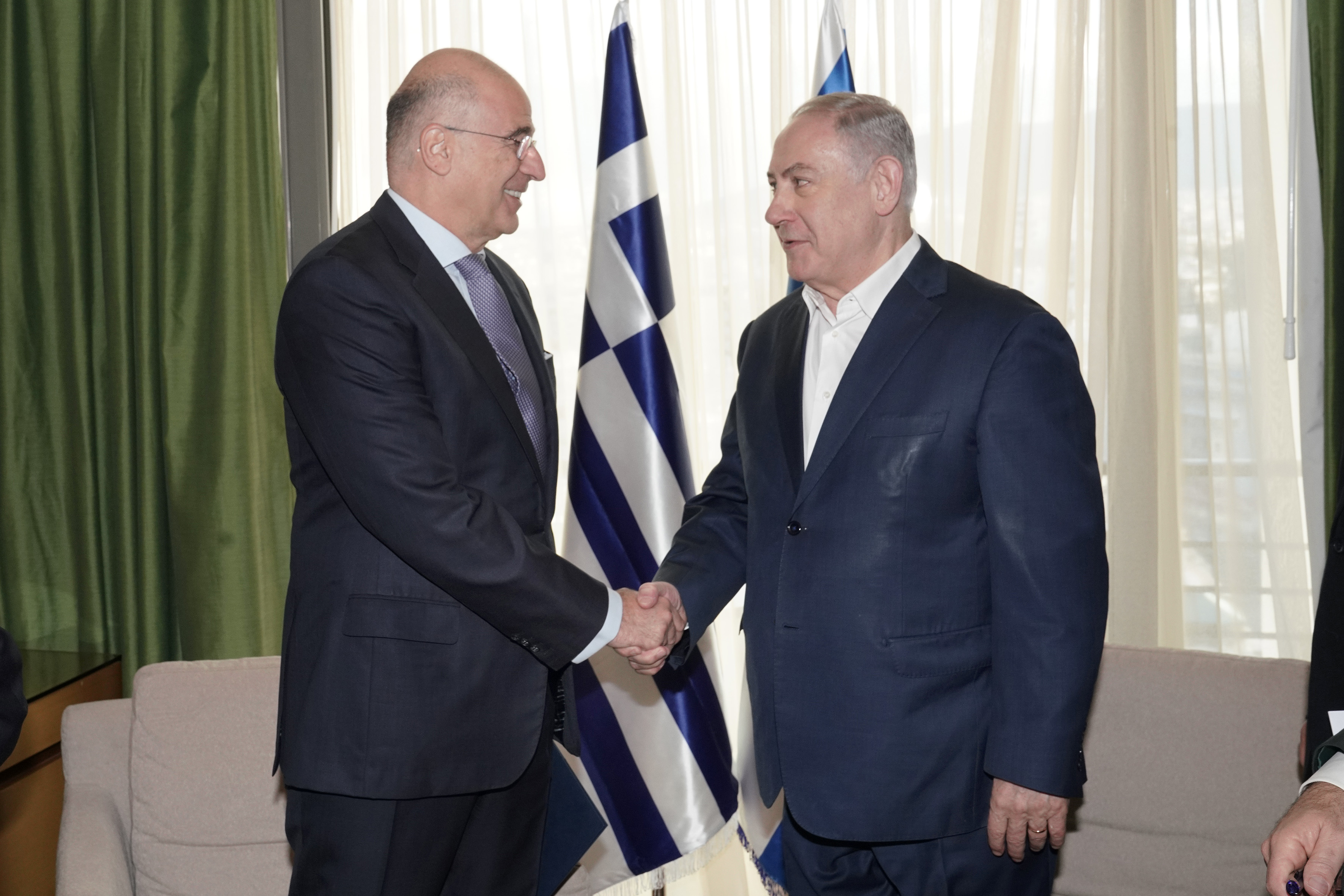 Συνάντηση ΥΠΕΞ, Ν. Δένδια, με ΠΘ Ισραήλ B. Netanyahu στο πλαίσιο της επίσκεψής του στην Αθήνα για την υπογραφή της Συμφωνίας EastMed (03.01.2020)